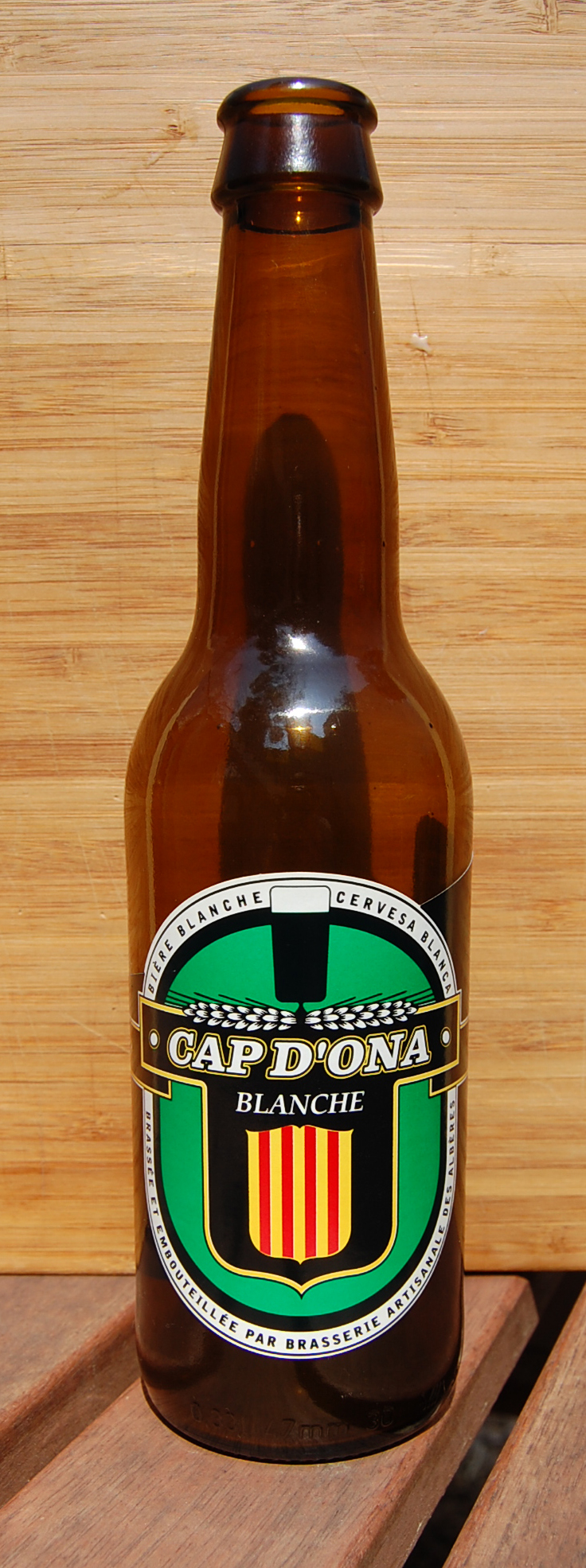 Cervesa Cap d'Ona (Argelers)